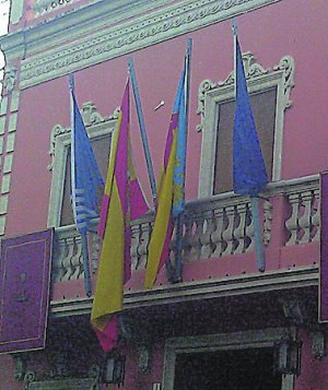 Casa de Ayuntamiento de Albalat